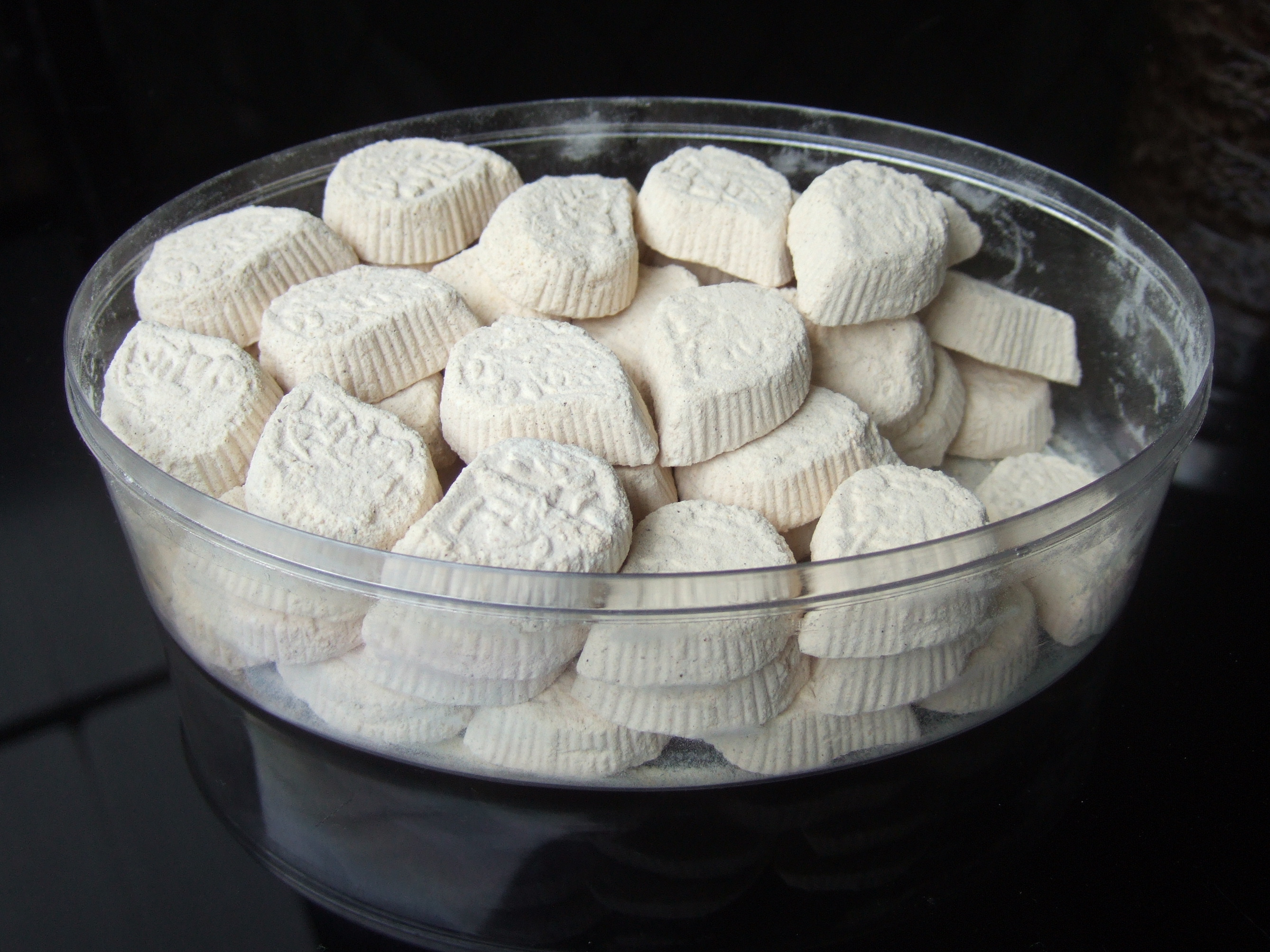 Kue satu